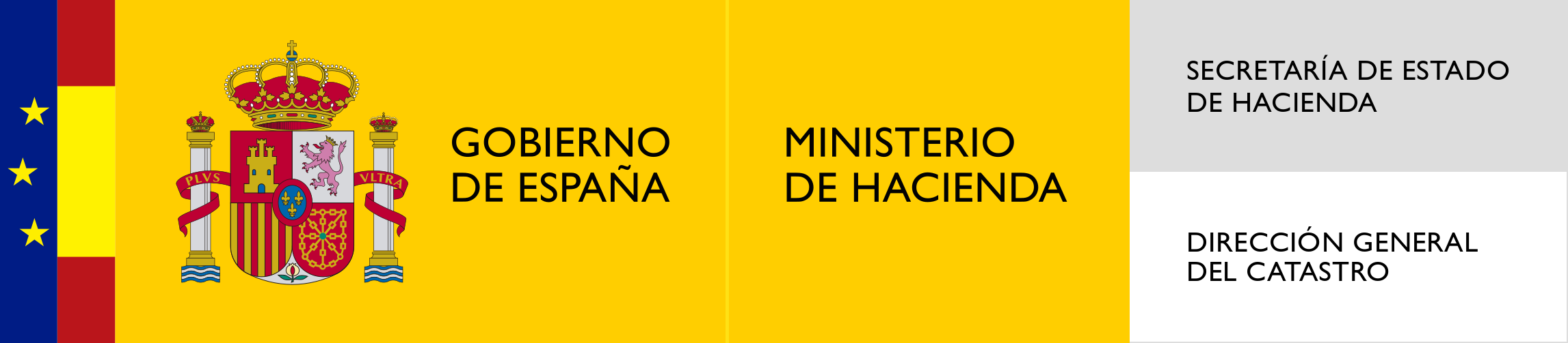 Logotipo de la Dirección General del Catastro